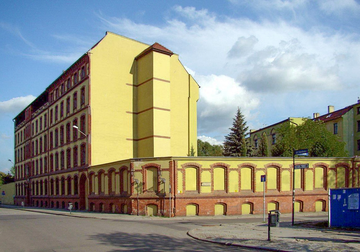 Dom Zakonny przy ulicy kard. Kominka. Trochę lepsze od , nie ma samochodu i drzewa po prawej :)